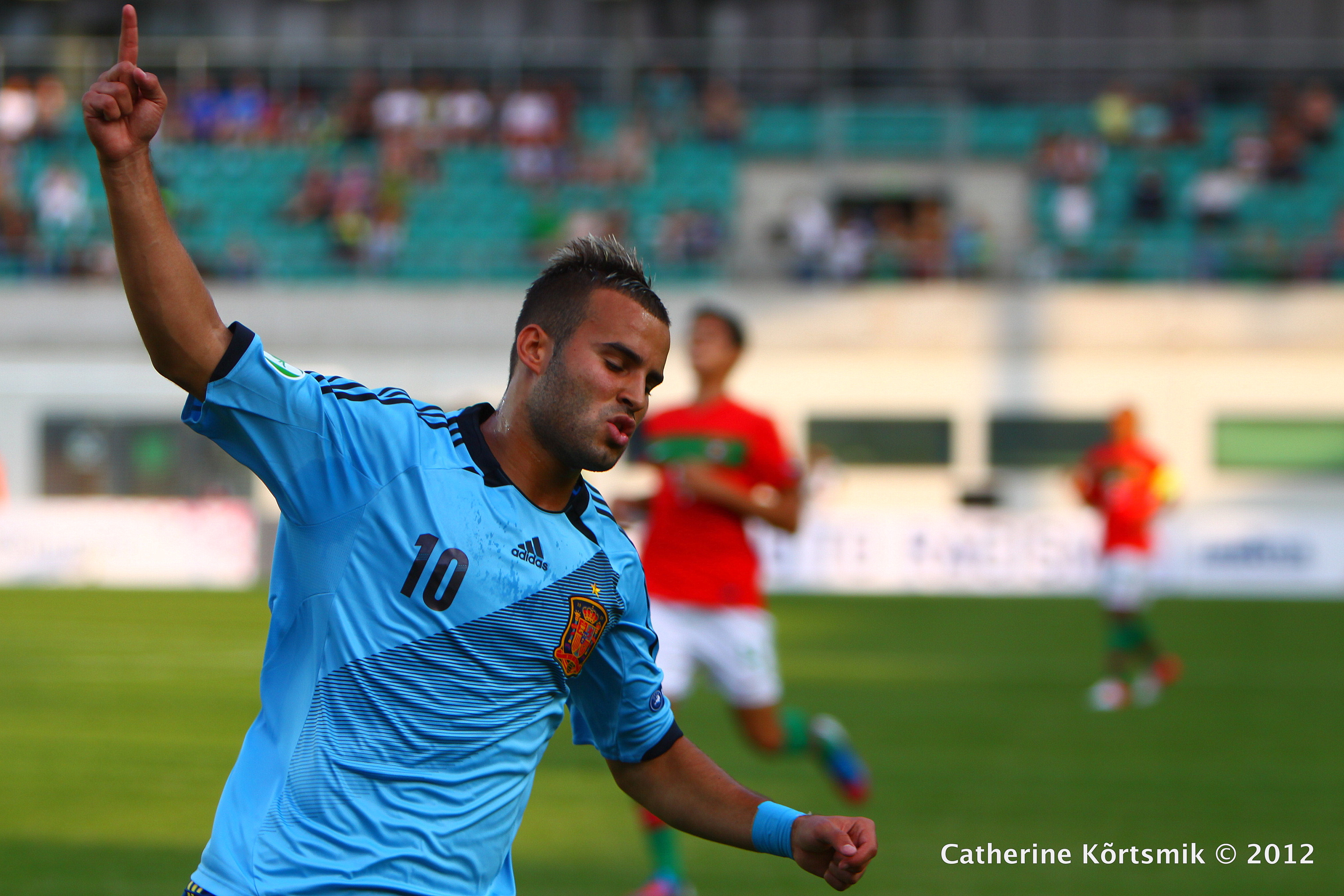 U-19 Portugal vs Spain.